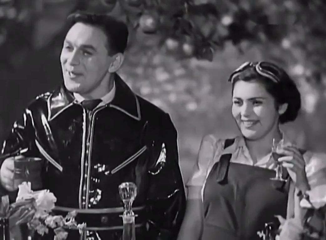 Леонид и Эдит Утёсовы. Исполнение песни "Будьте здоровы, живите богато" (фрагмент фильма "Концерт на экране")